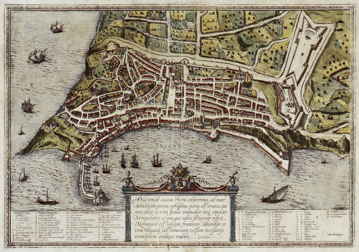 Ancona